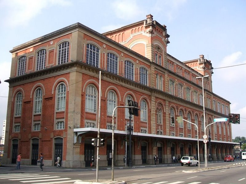 Estação Pinacoteca, no Bom Retiro, cidade de São Paulo, Brasil.